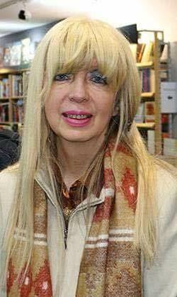 Escritora argentina